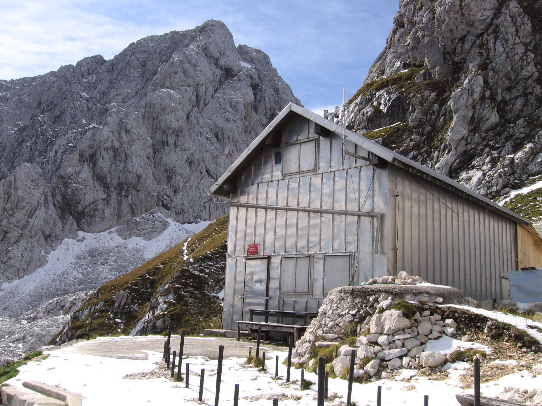 Hut Zavetišče pod Špičkom, in Julian Alps, behind is Mt. Pelc nad Klonicami